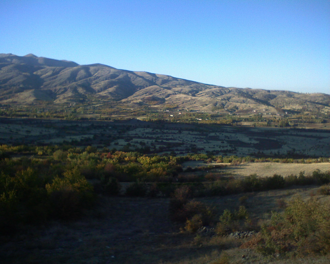 Gün batarken (Pincirik)